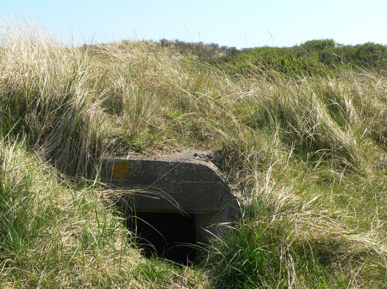 Wangerooge mit überwuchertem Bunkereingang in den Dünen